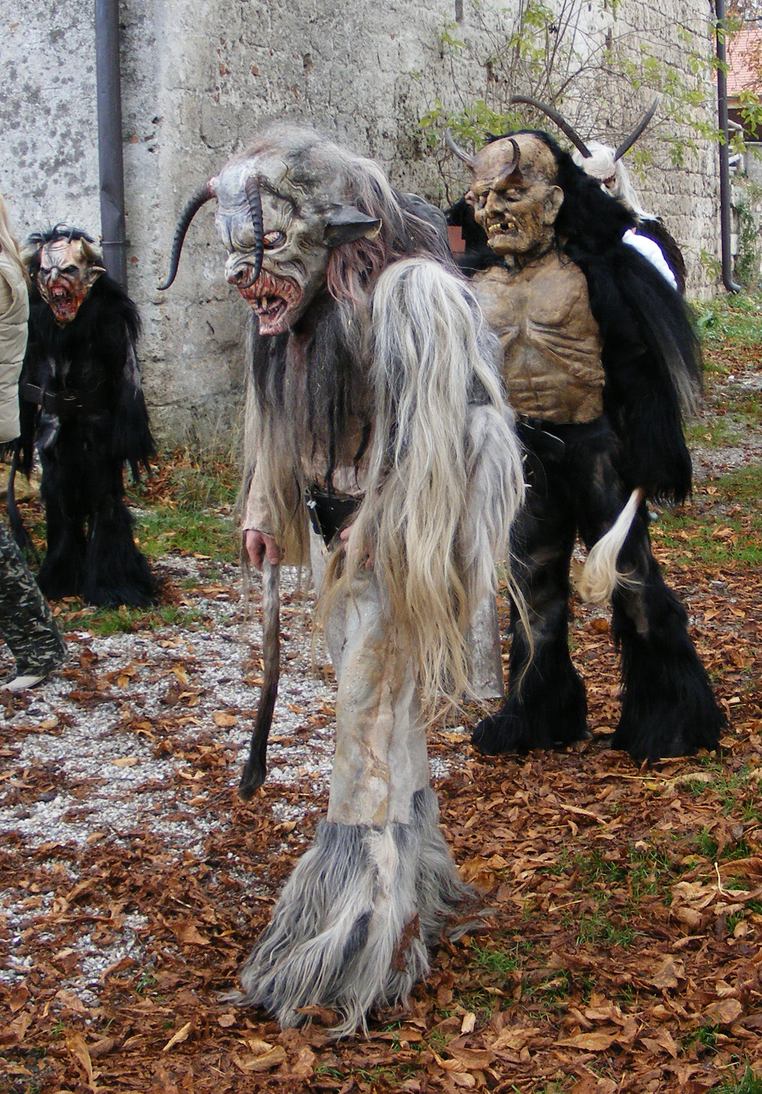 Monster in Braunau am Inn, Oberösterreich